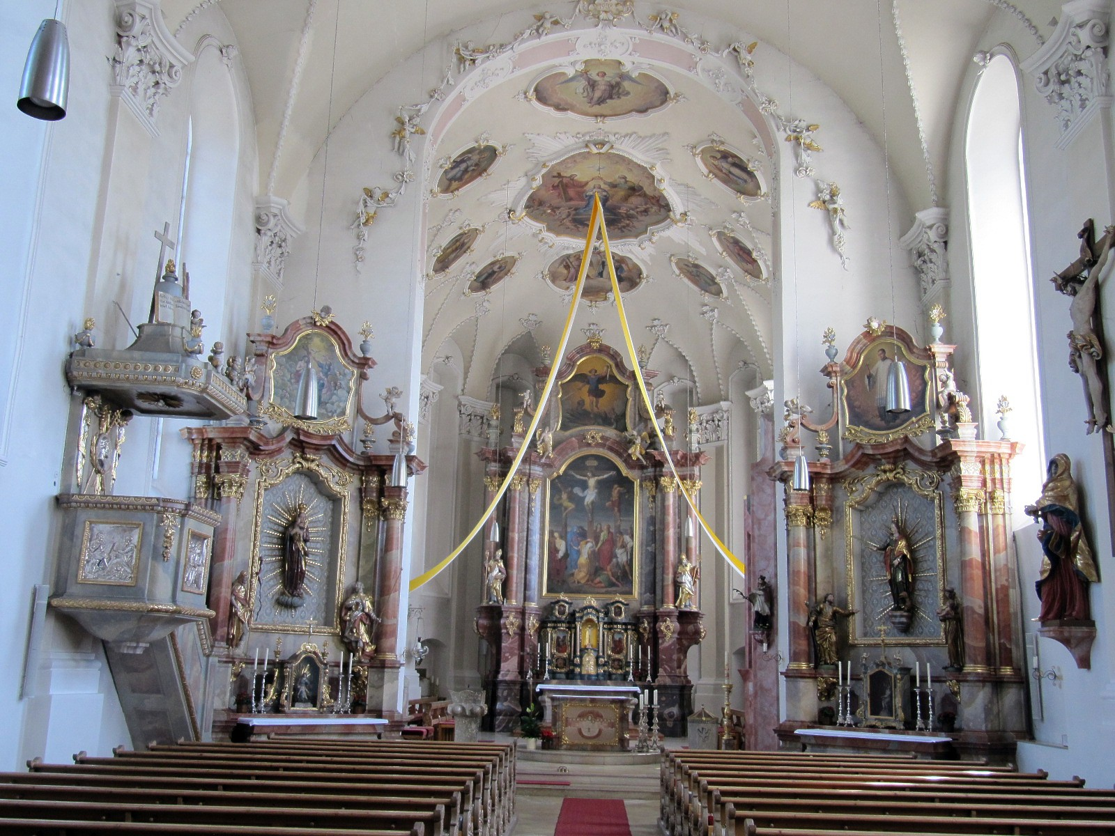 Innenansicht der Kirche St.Michael (Rohrbergkirche), in Hengersberg